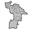 o vale do rio pardo, versão pixelizada